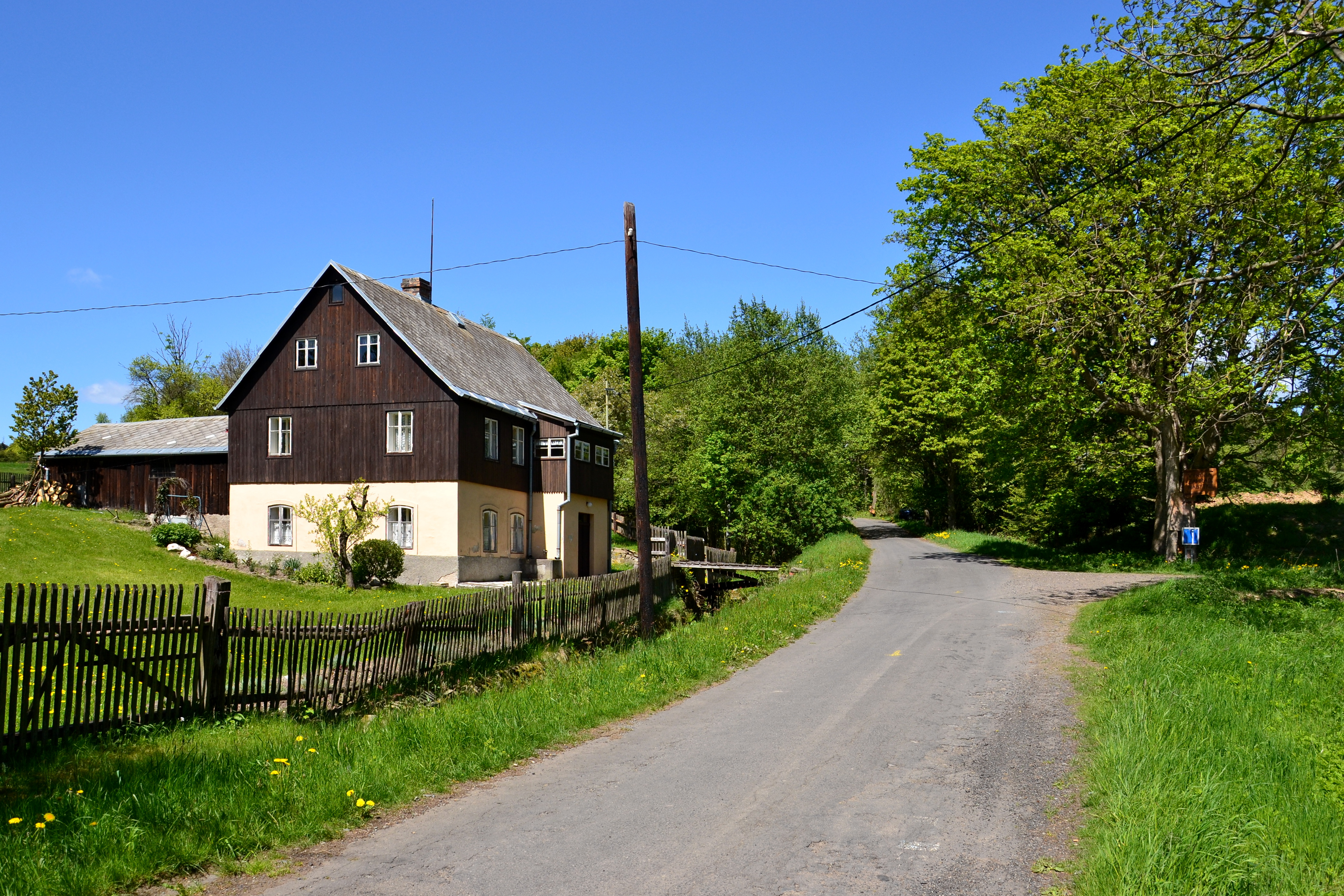 Dům západně od kostela